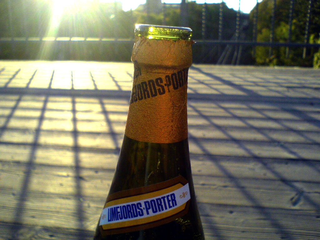 Limfjordsporter